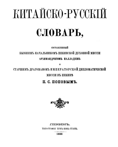 титульна сторінка Китайсько-руського словника, виданого 1888 року в Пекіні в типографії Тунъ Вэнь Гуань